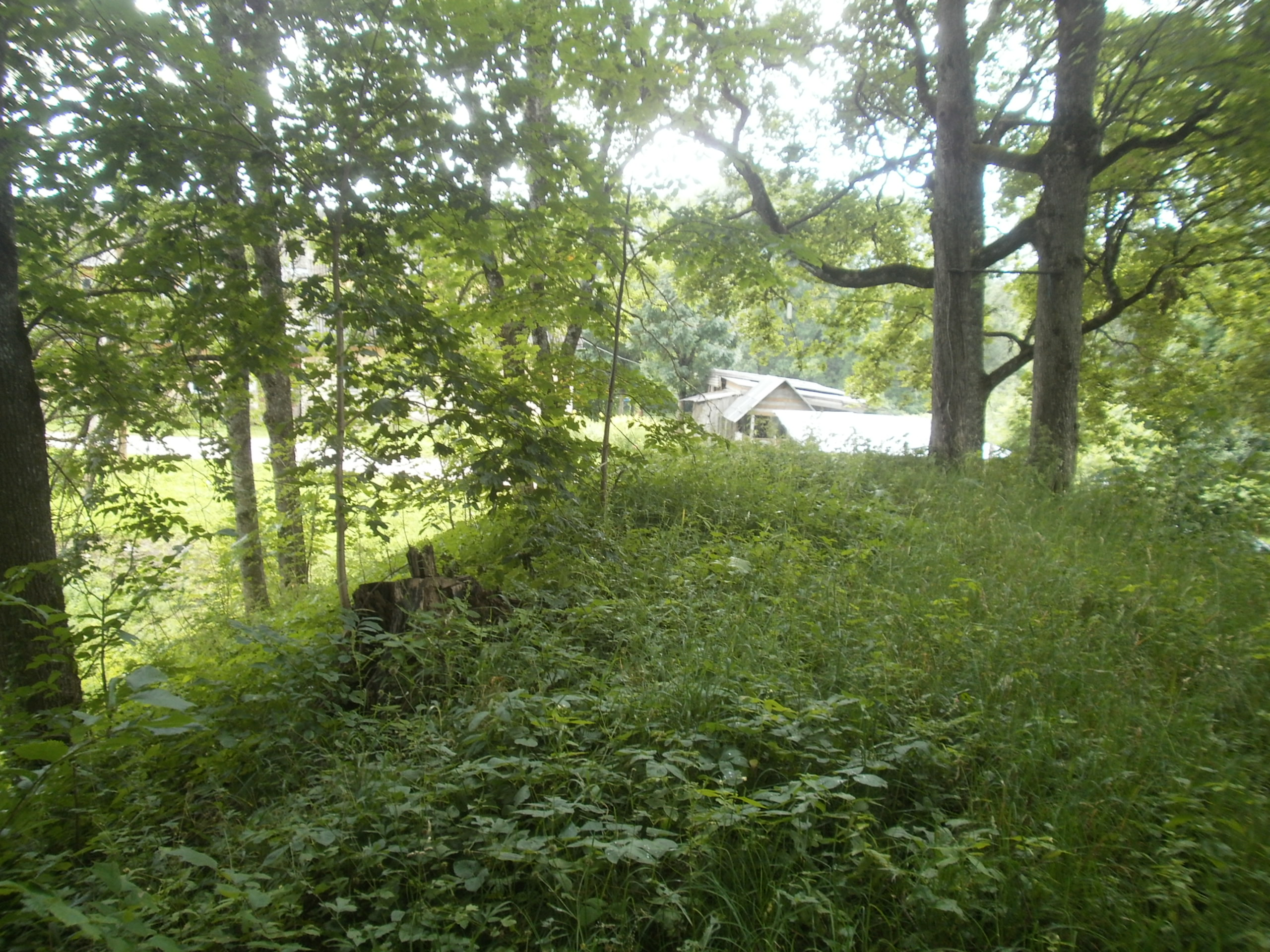 Linnuseala lõunaküljel asuv valliküngas. Vaade lõuna suunas, juuli 2014.